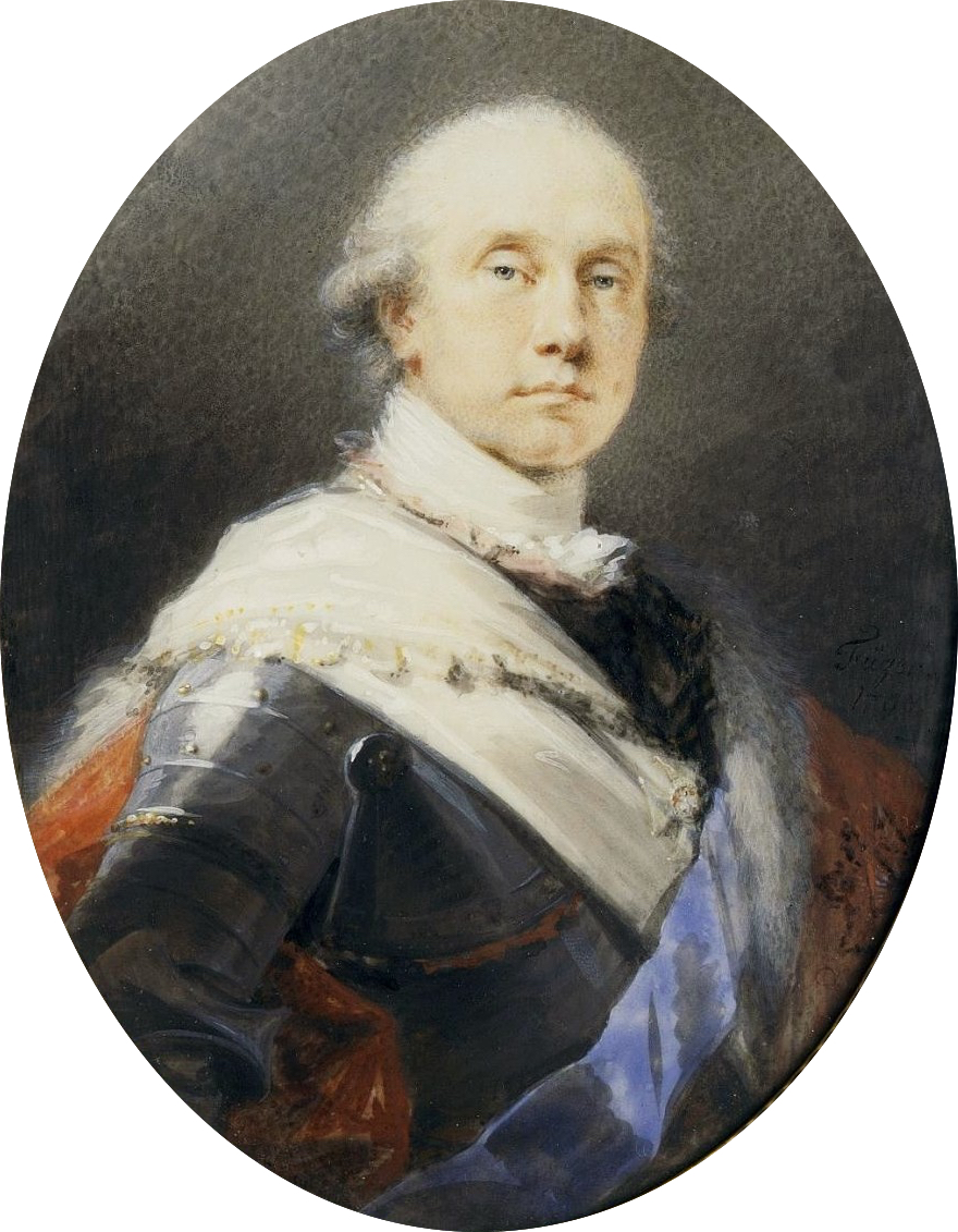 Принц Карл Нассау-Зиген (1745-1808)